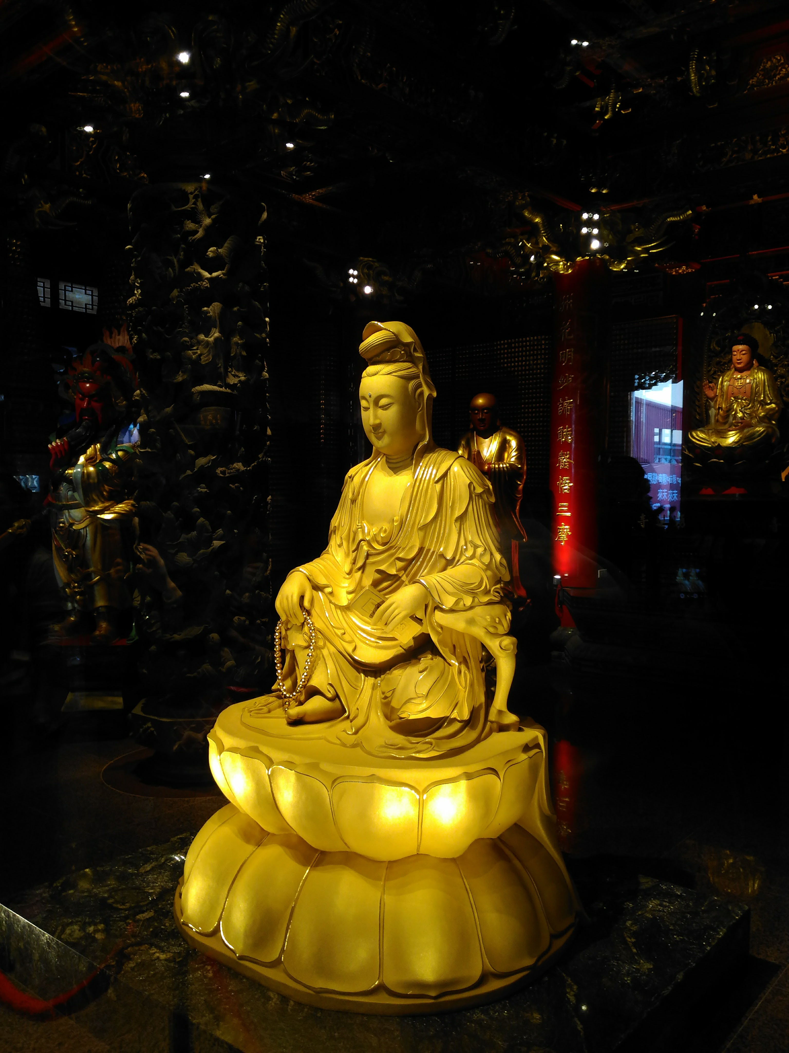 蘆洲區湧蓮寺三寶殿金觀音佛像